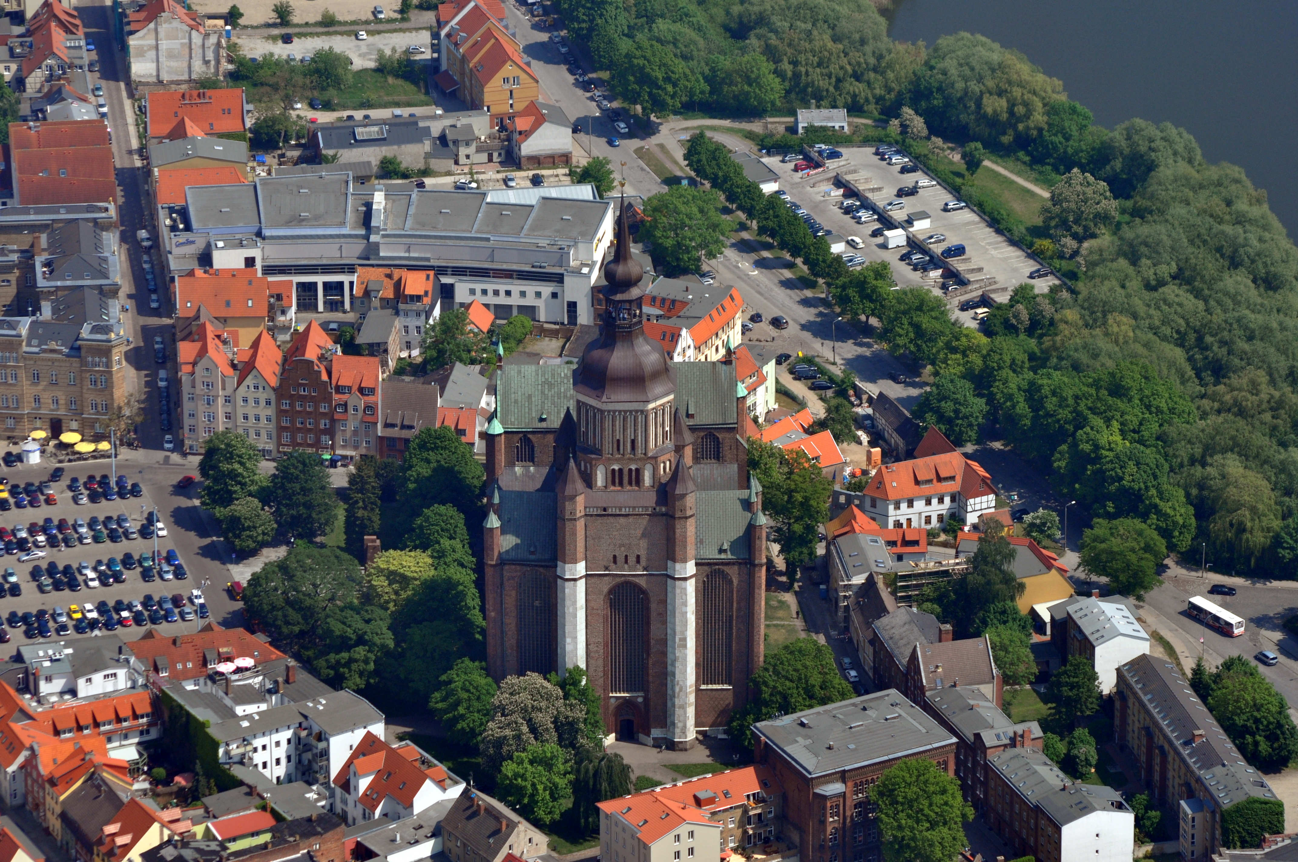 Die Bilder wurden von mir während eines einstündigen Rundflugs ab Flugplatz Güttin am 21. Mai 2011 aufgenommen. Die Bildbeschreibung steht im Dateinamen. Aufgenommen mit einer Nikon D5000 durch das Seitenfenster des Flugzeugs.